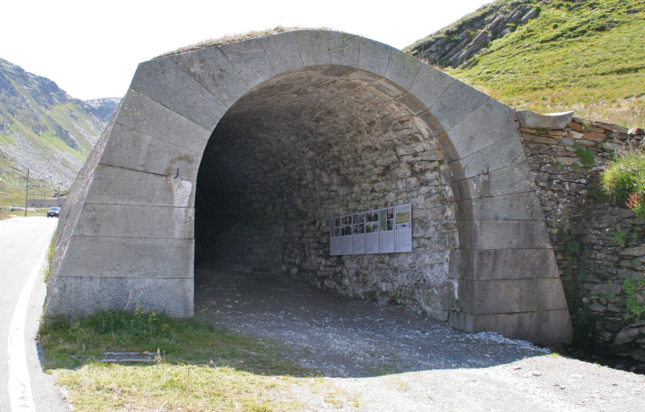 Splügengalerie unteres Portal